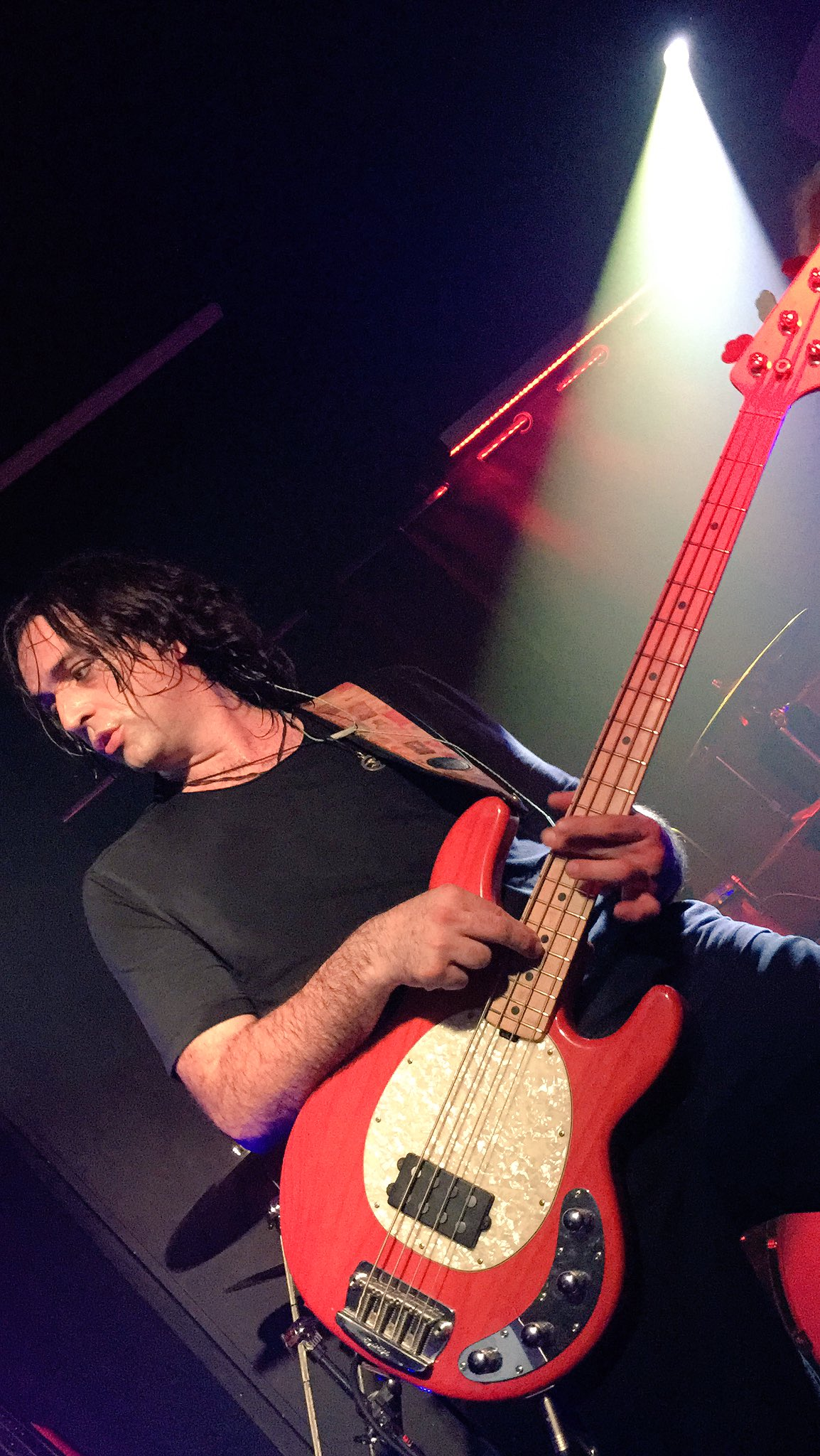 Andrea Ra Live